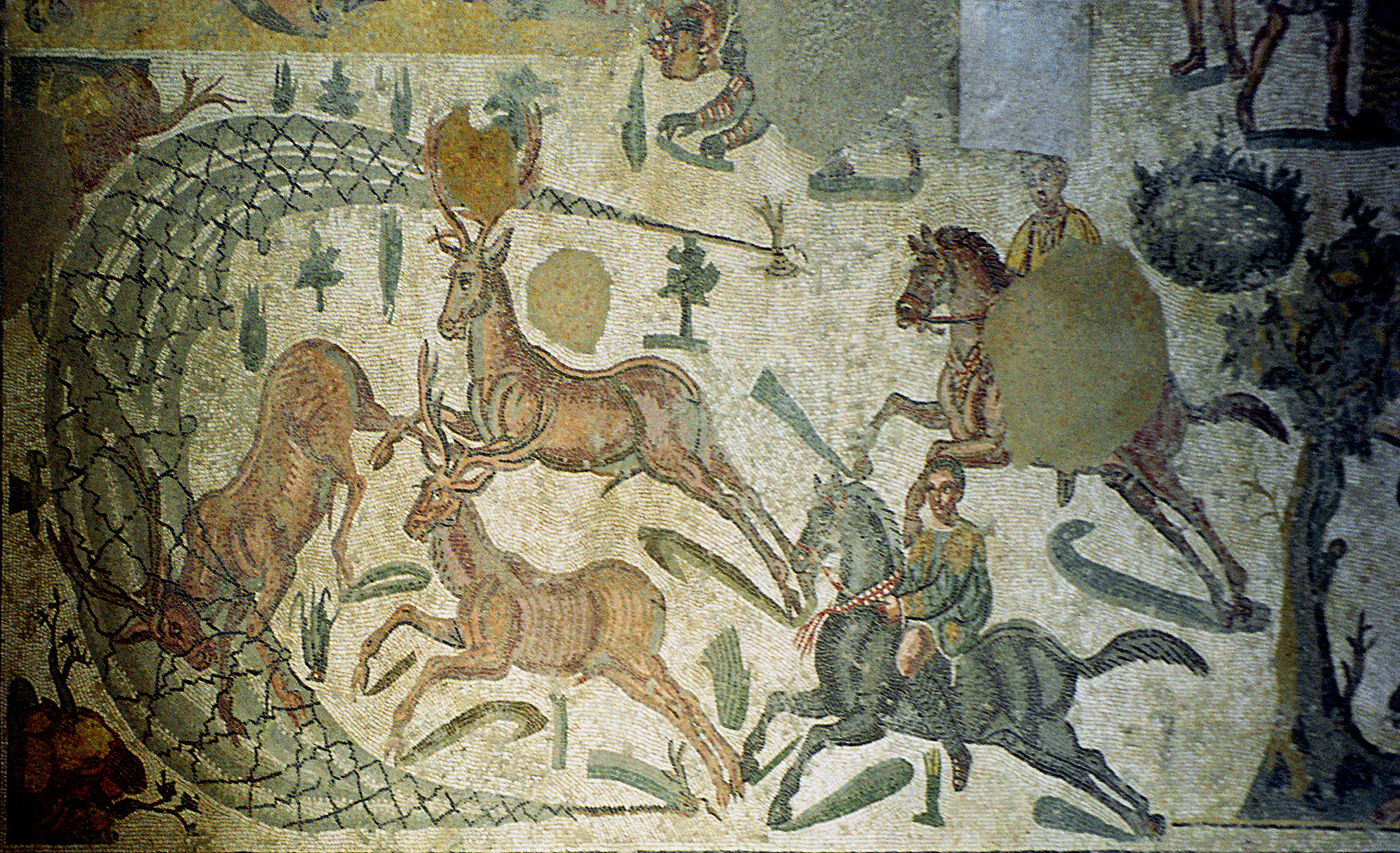 Sicily, Villa Romana del Casale